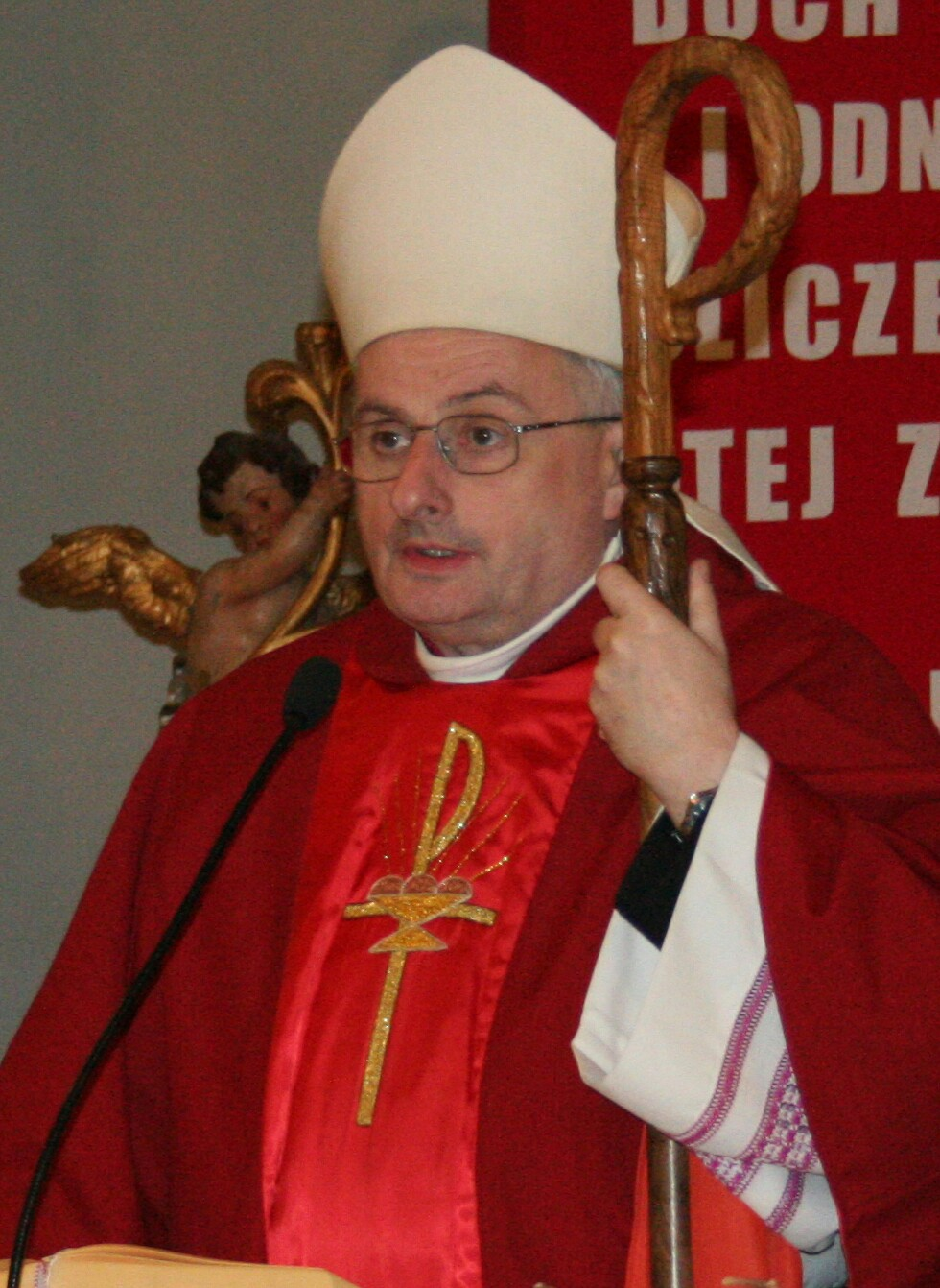 biskup Jacek Jezierski podczas bierzmowania w Bisztynku